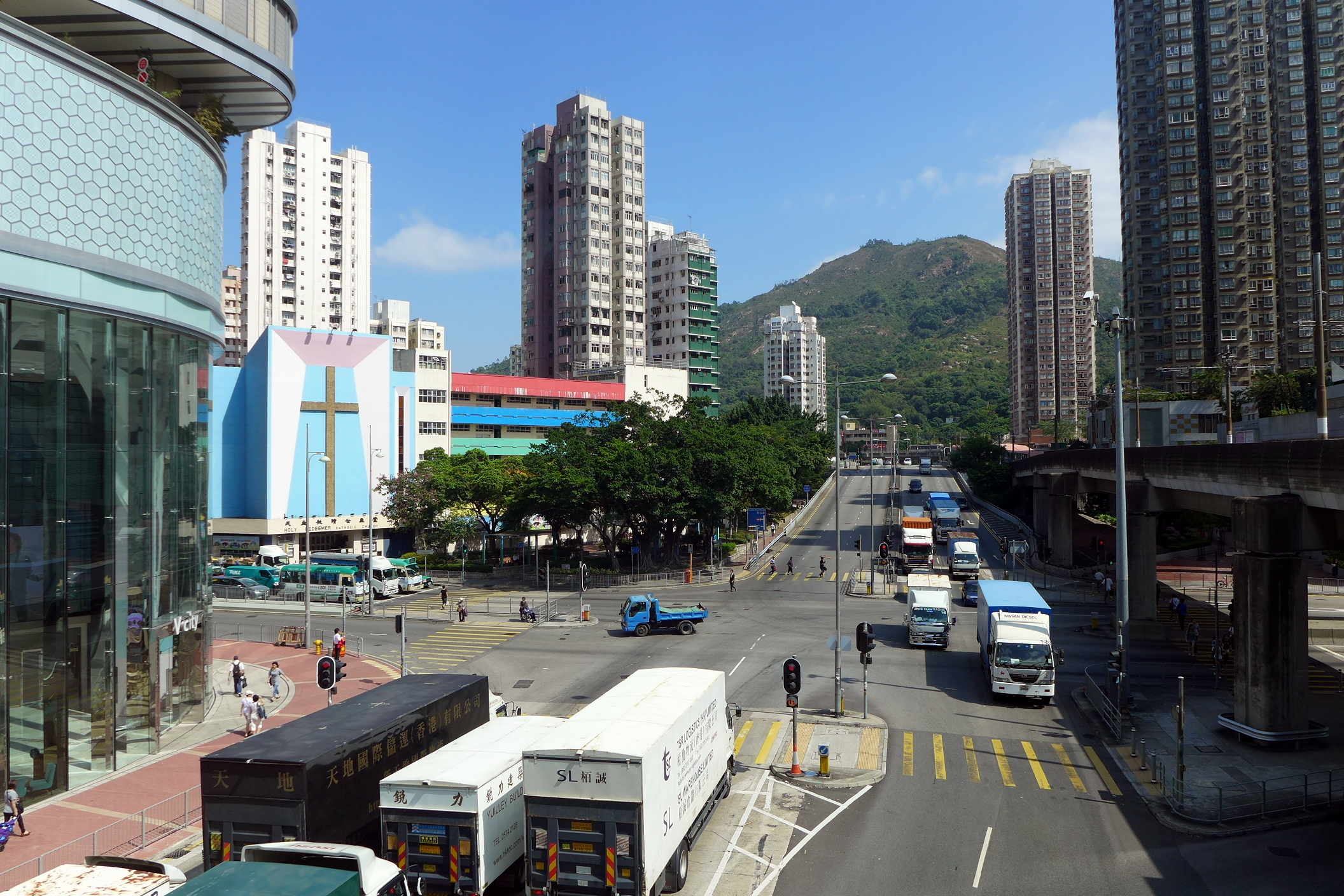 Pui To Road